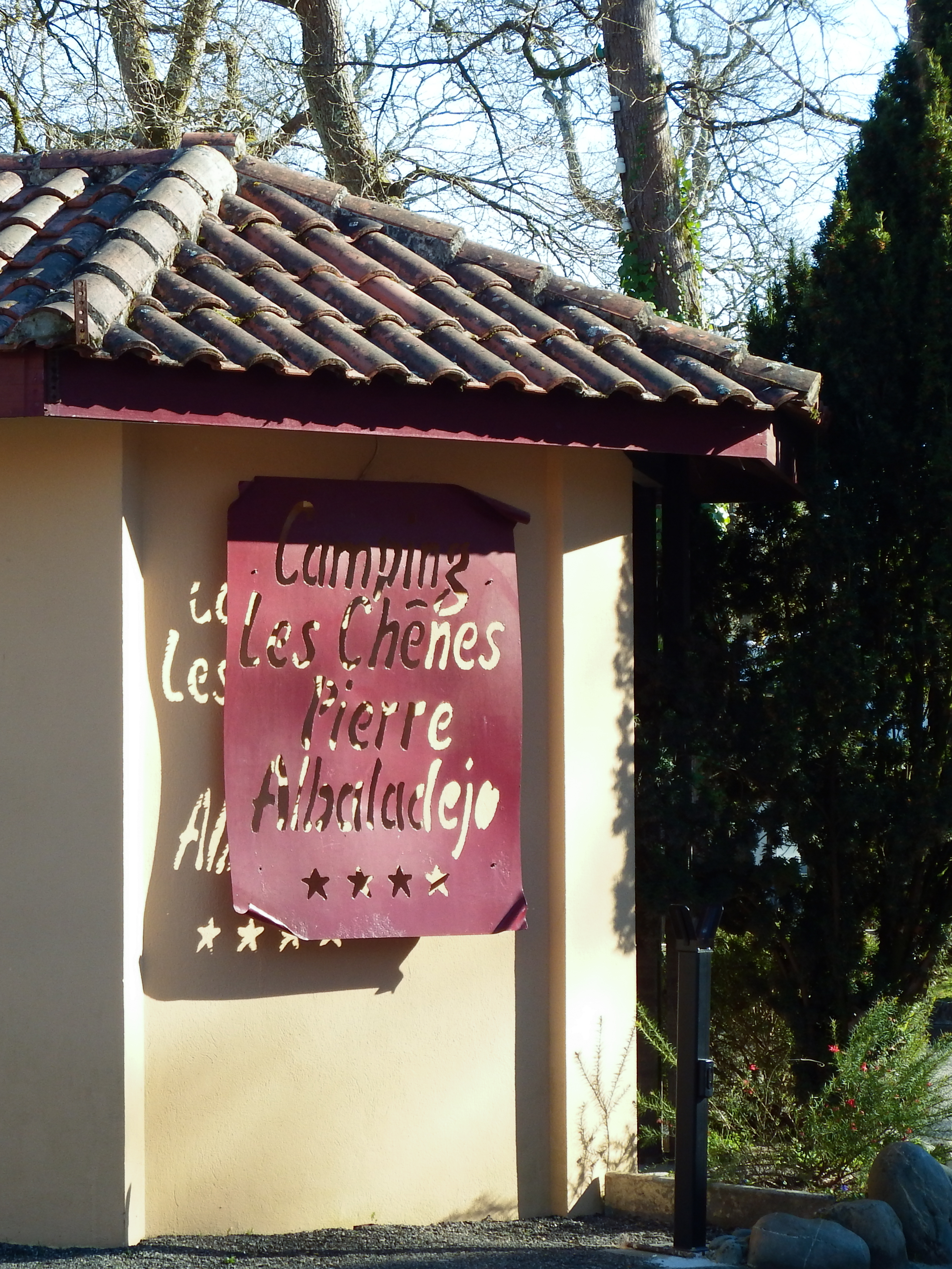 Camping les Chênes de Dax